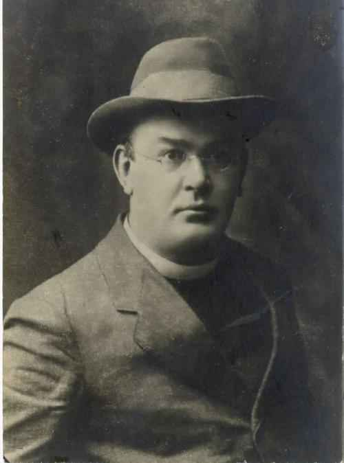 Janez Evangelist Krek (1865-1917), Slovene politician.